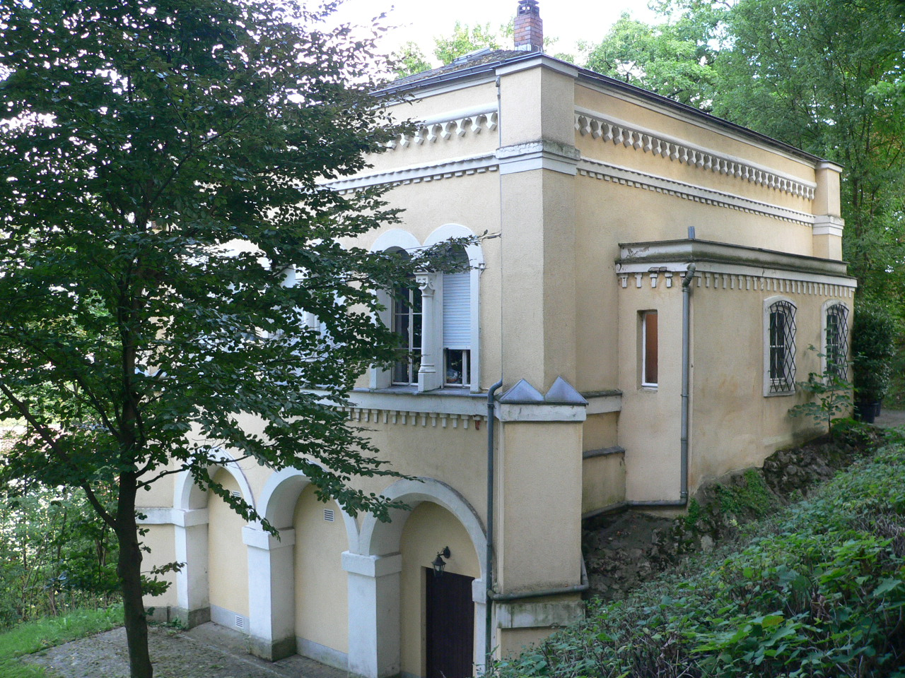 "Tusculum" in Coburg auf dem Adamiberg